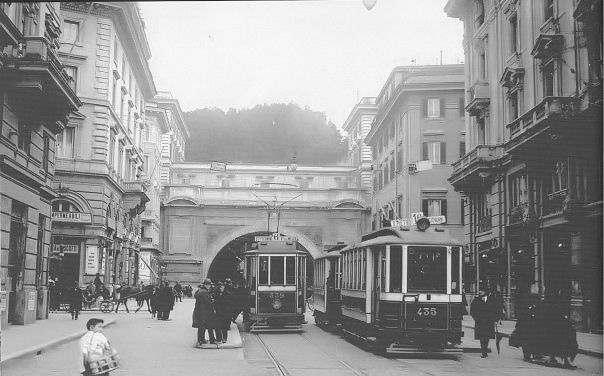 via Milano traforo